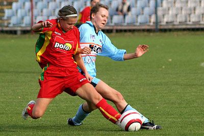 Piłkarka Gola (strój błękitny) w akcji przeciw Medykowi Konin